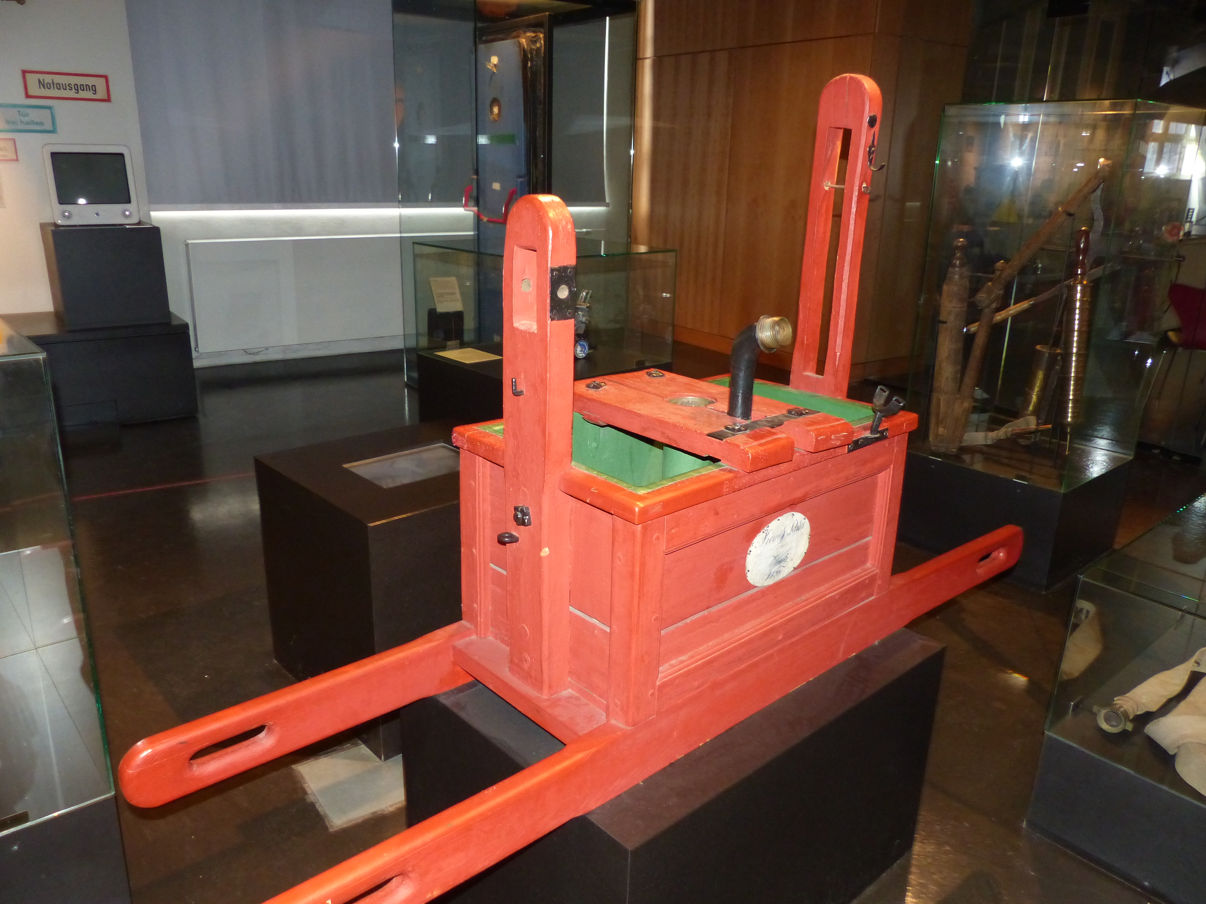 Handdruck-Kastenspritze mit Hanfschlauch, Schloss Pillnitz, 1839, Exponat in den Technischen Sammlungen Dresden